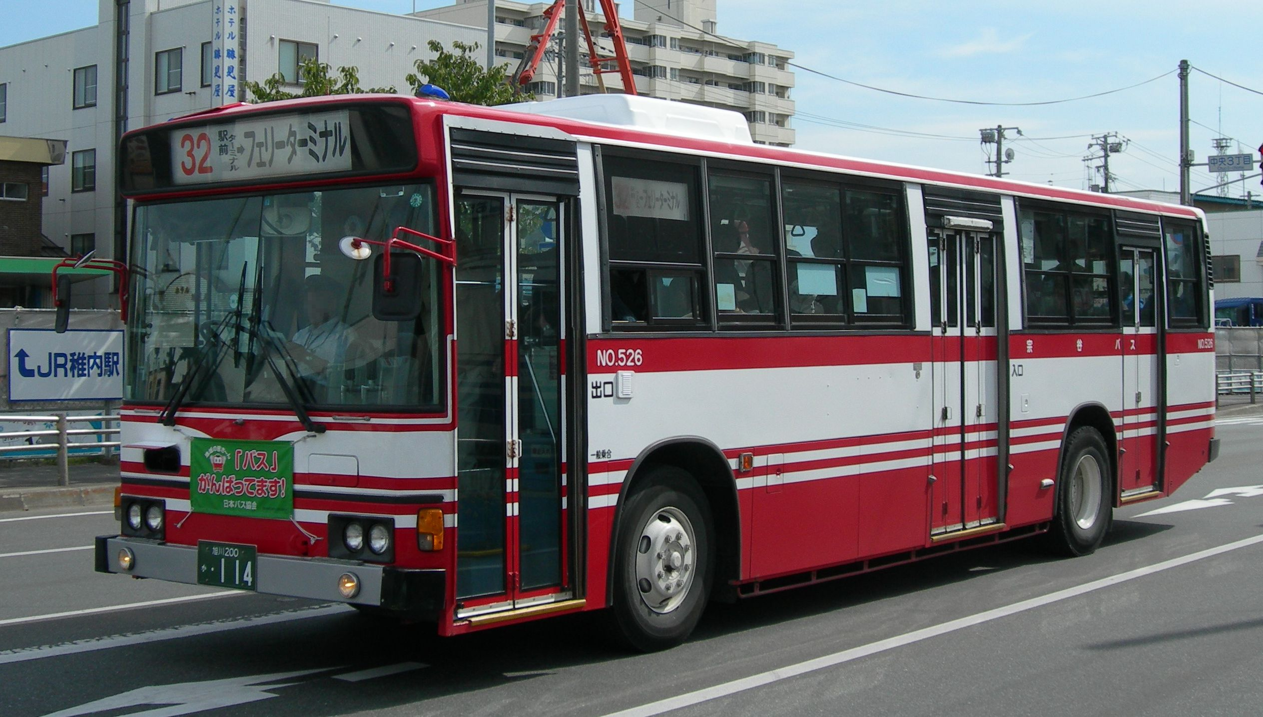 Sōya Bus, Omnibus car 宗谷バス 路線用車両